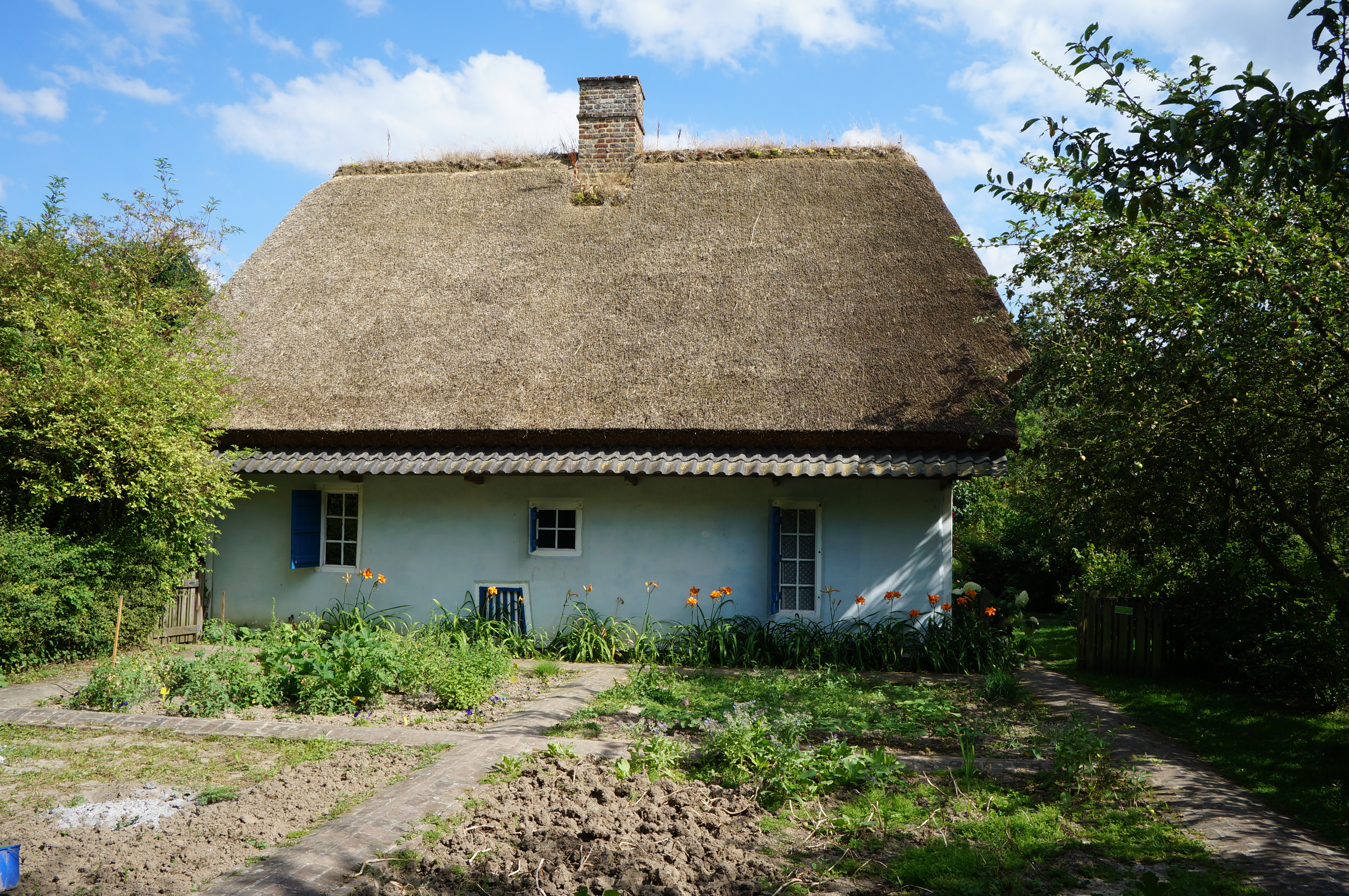 "La maison de la sorcière Zoé", une chaumière de Millam et son jardin Villeneuve d'Ascq, Musée de Plein air , Villeneuve-d'Ascq,France